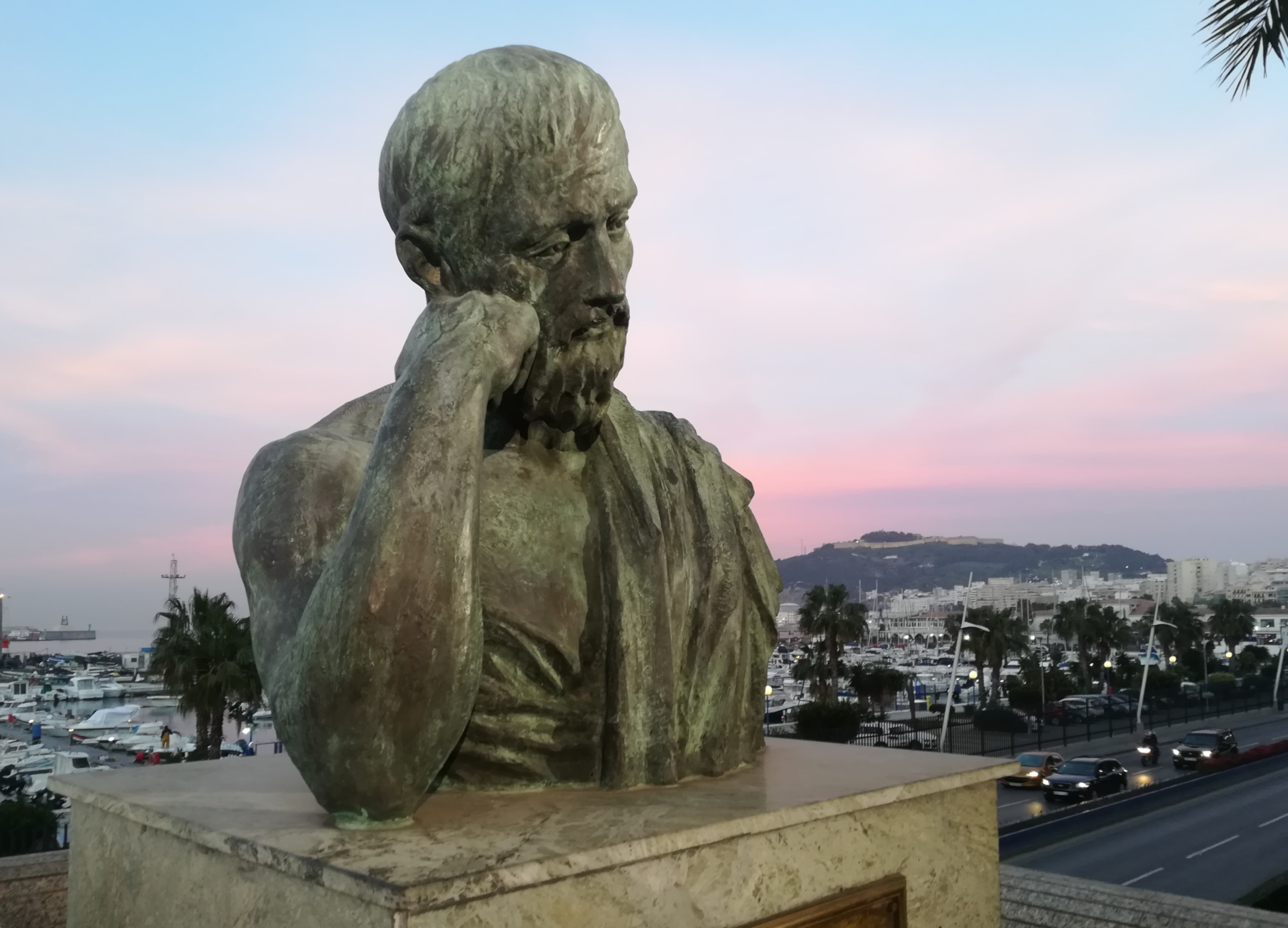 Estatua de Platón. Ceuta. España.